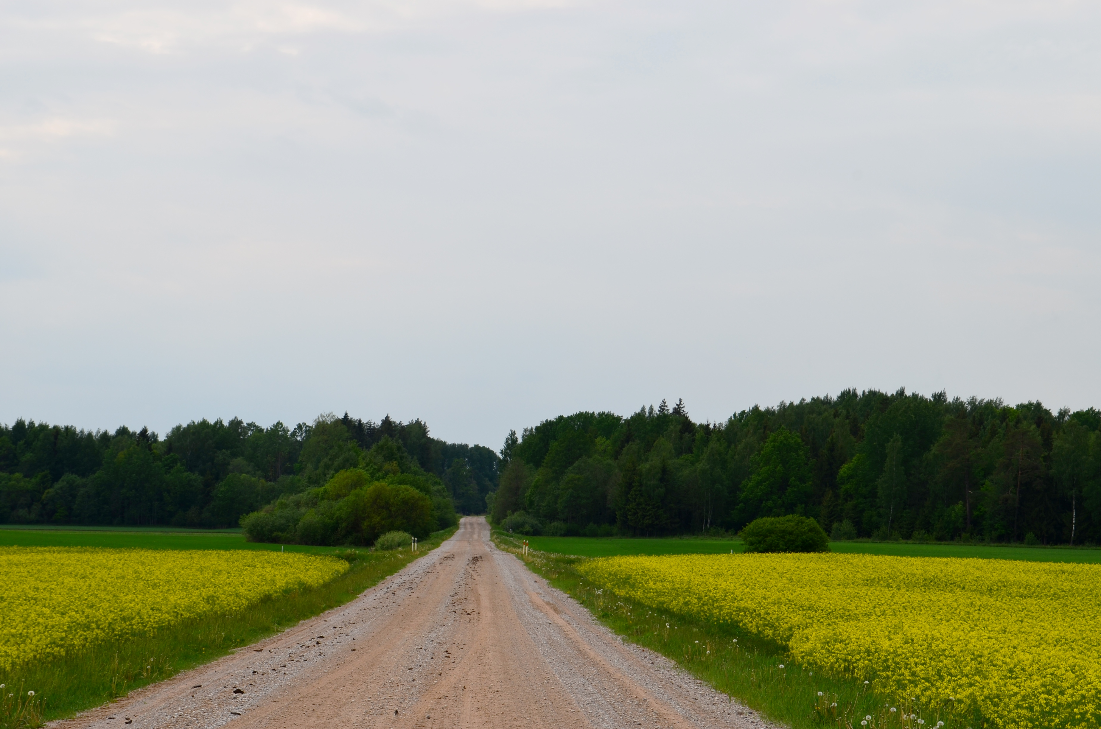 Žaiginio miškas nuo Maižiškių, Raseinių r.